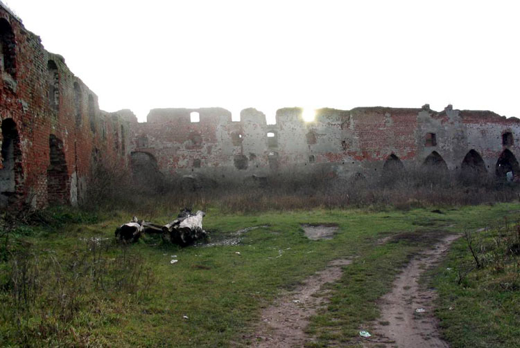 Руины замка Брандербург в 2003 году.